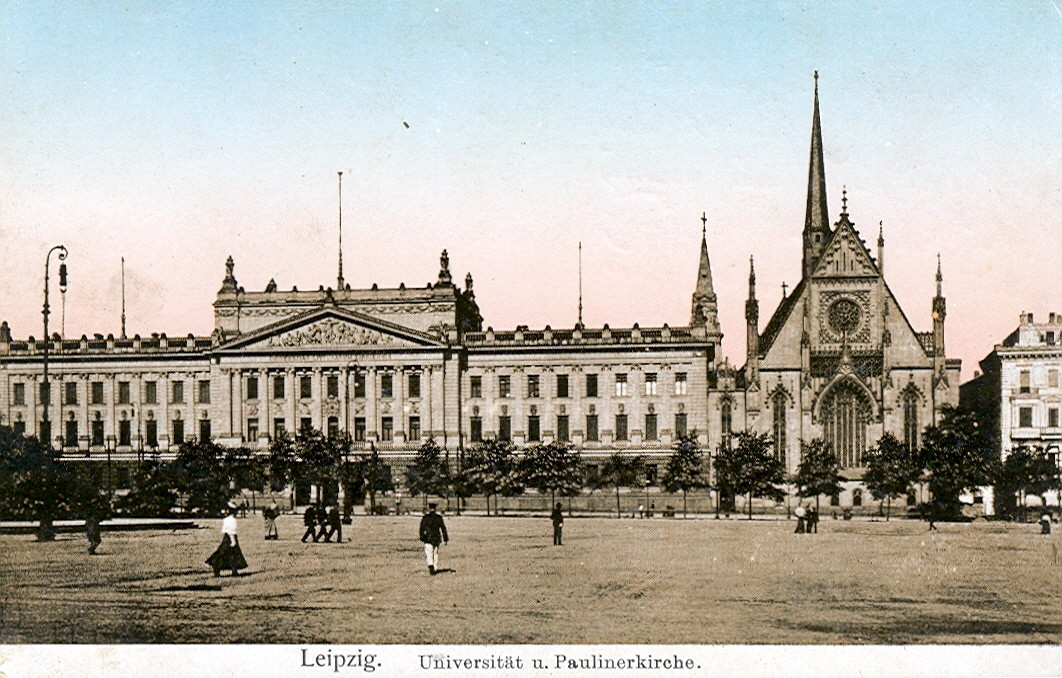 Postkarte, datiert 20.5.1917. Beschriftung: "Leipzig - Universität und Paulinerkirche."